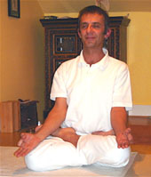 Yoga postures Padmasana